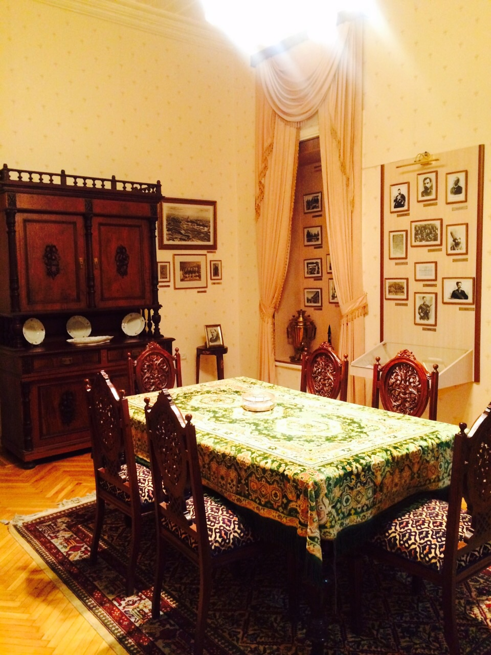 Qonaq otağı